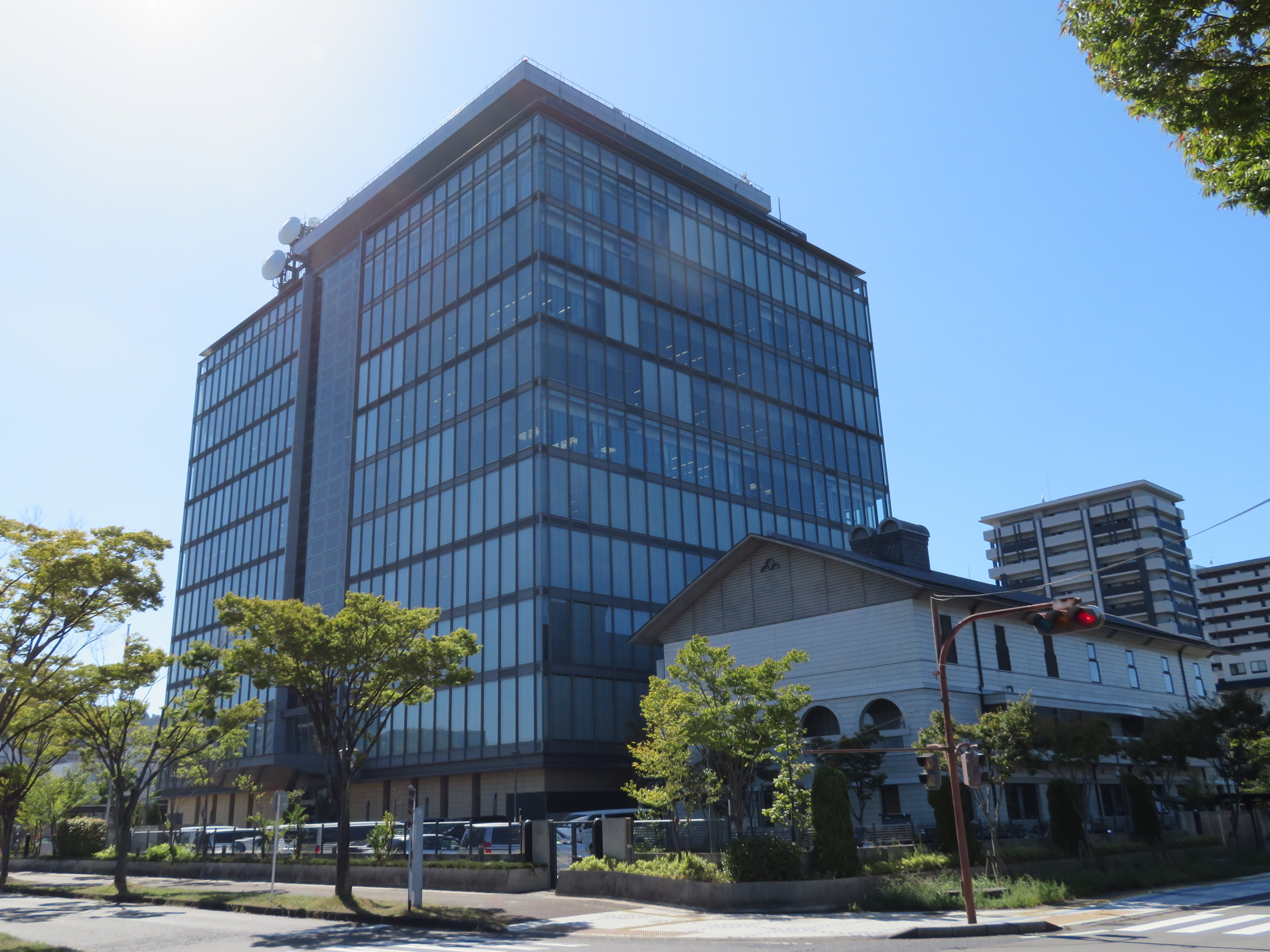 滋賀県警察本部庁舎